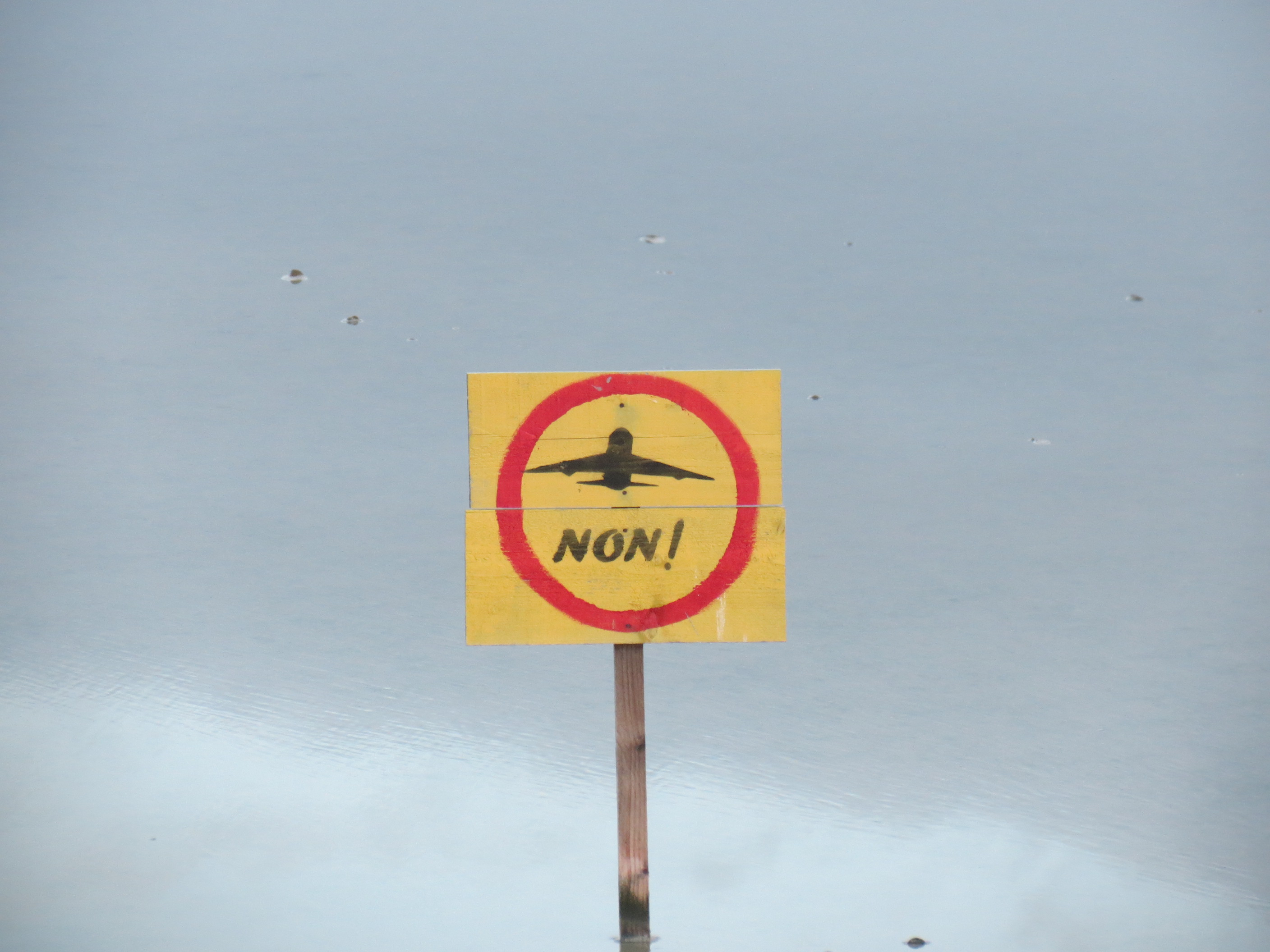 Guérande - Marais salant - NDDL